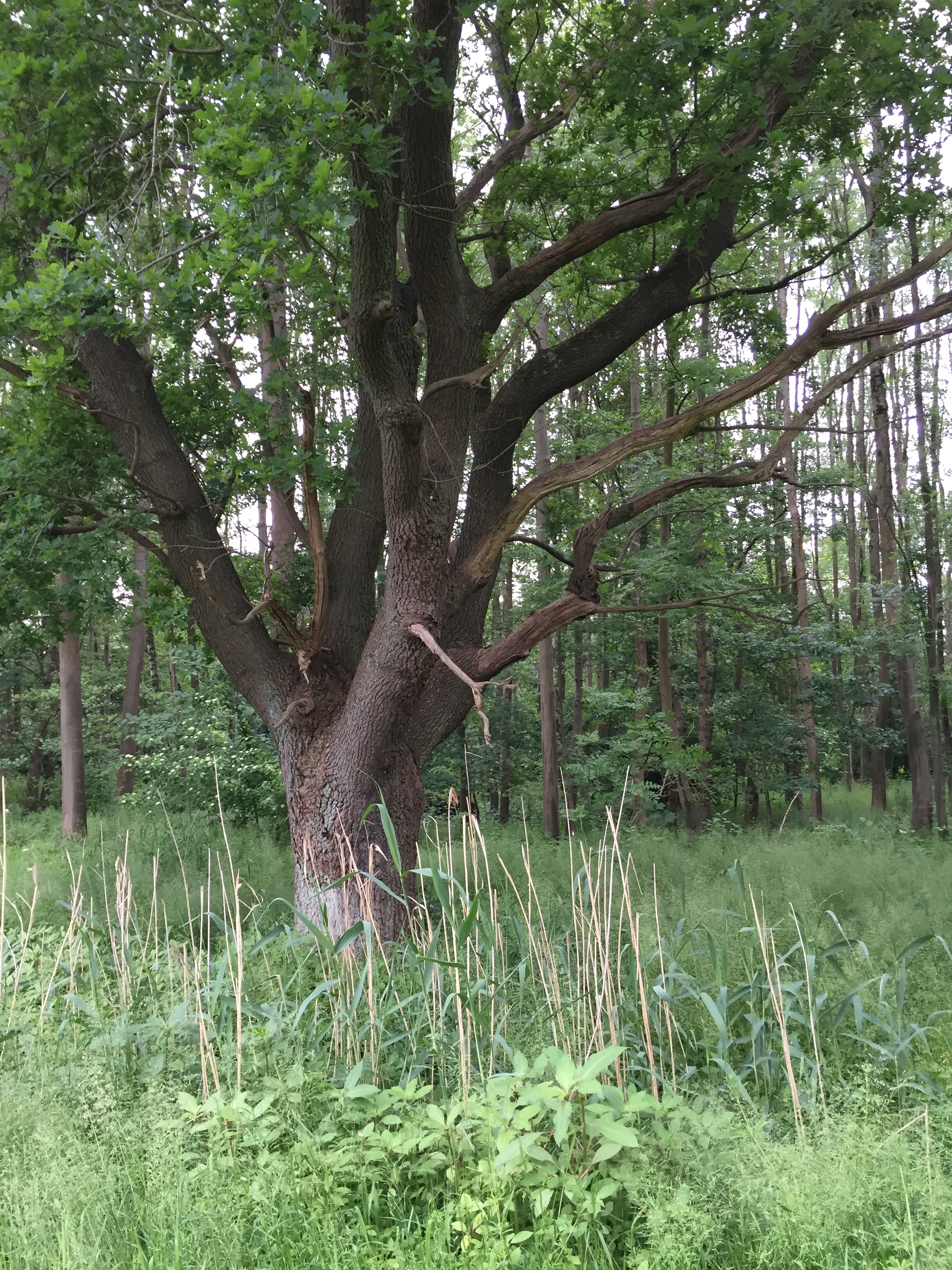 Eiche und Erlenbruchwald am Siebenbrückenweg im Naturschutzgebiet „Eller Forst“ in Düsseldorf